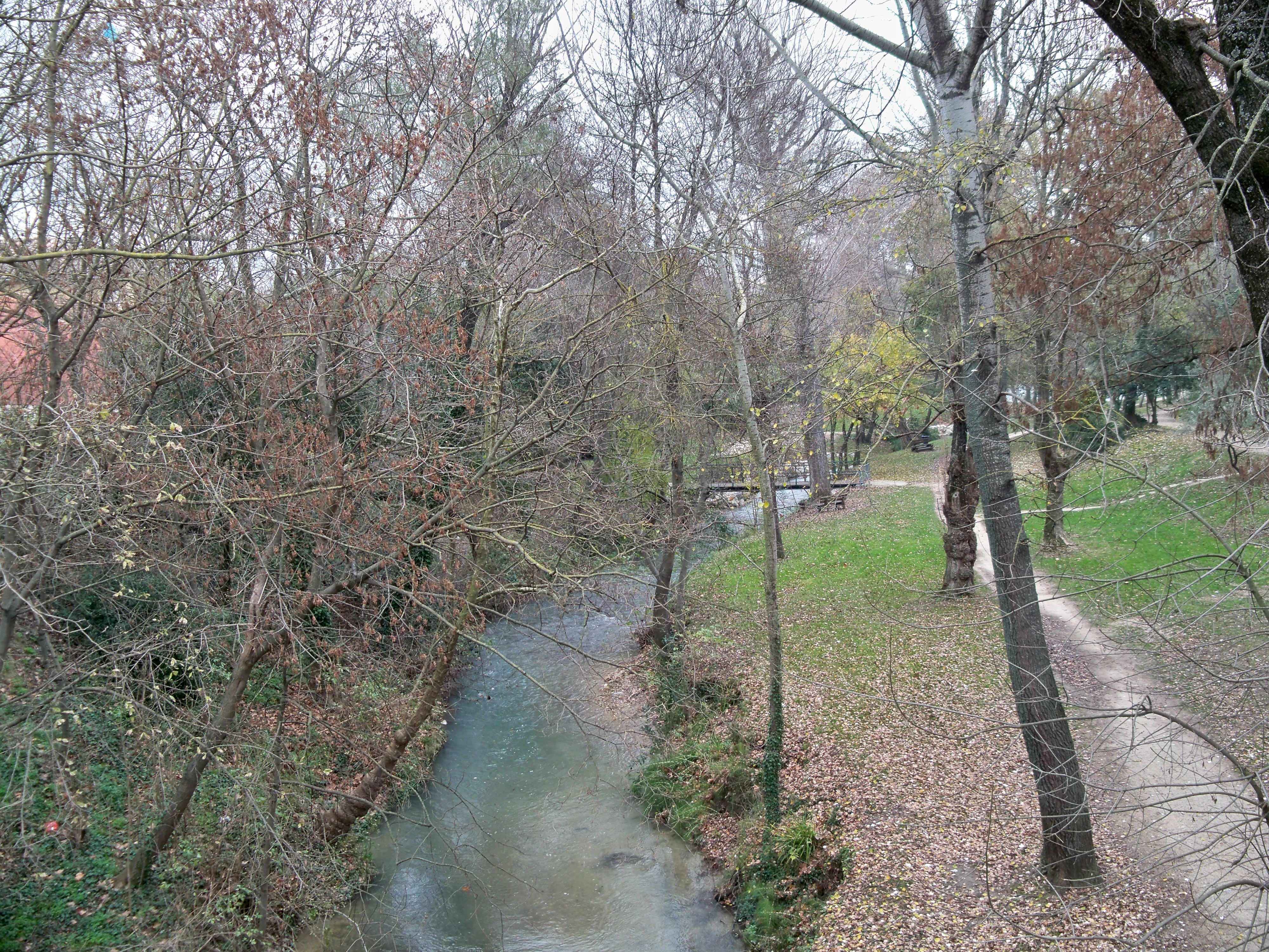 l'Auzon à Carpentras, Vaucluse, France